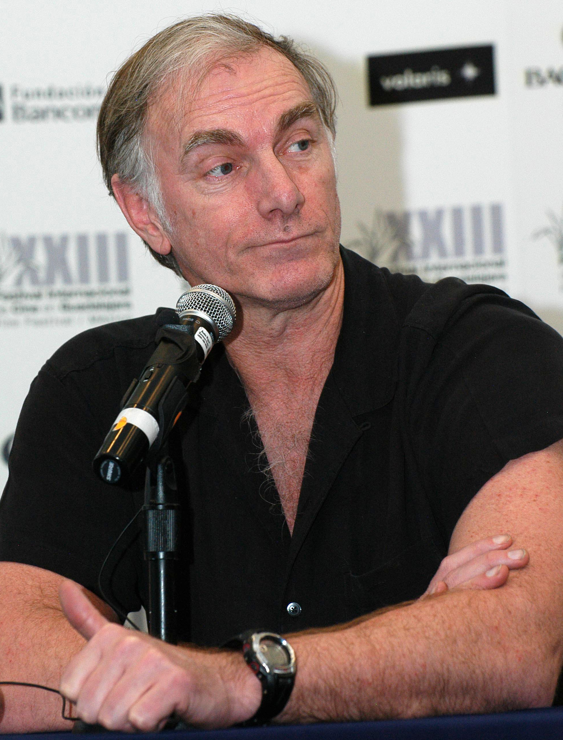 Guadalajara, Jalisco, 10 de marzo de 2008. John Sayles en la rueda de prensa de la película Honeydripper.